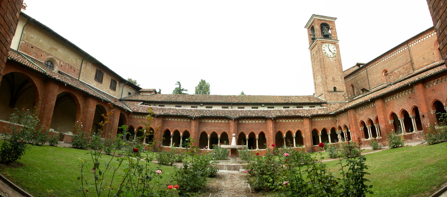 L'Abbazia di Chiaravalle a Milano. Foto da me realizzata. Aggiornamento licenza da cc-by-nc-sa-2.0-it alla seguente in data 27/05/2007 --yoruno sparisci sott'acqua 12:03, 26 mag 2007 (CEST)